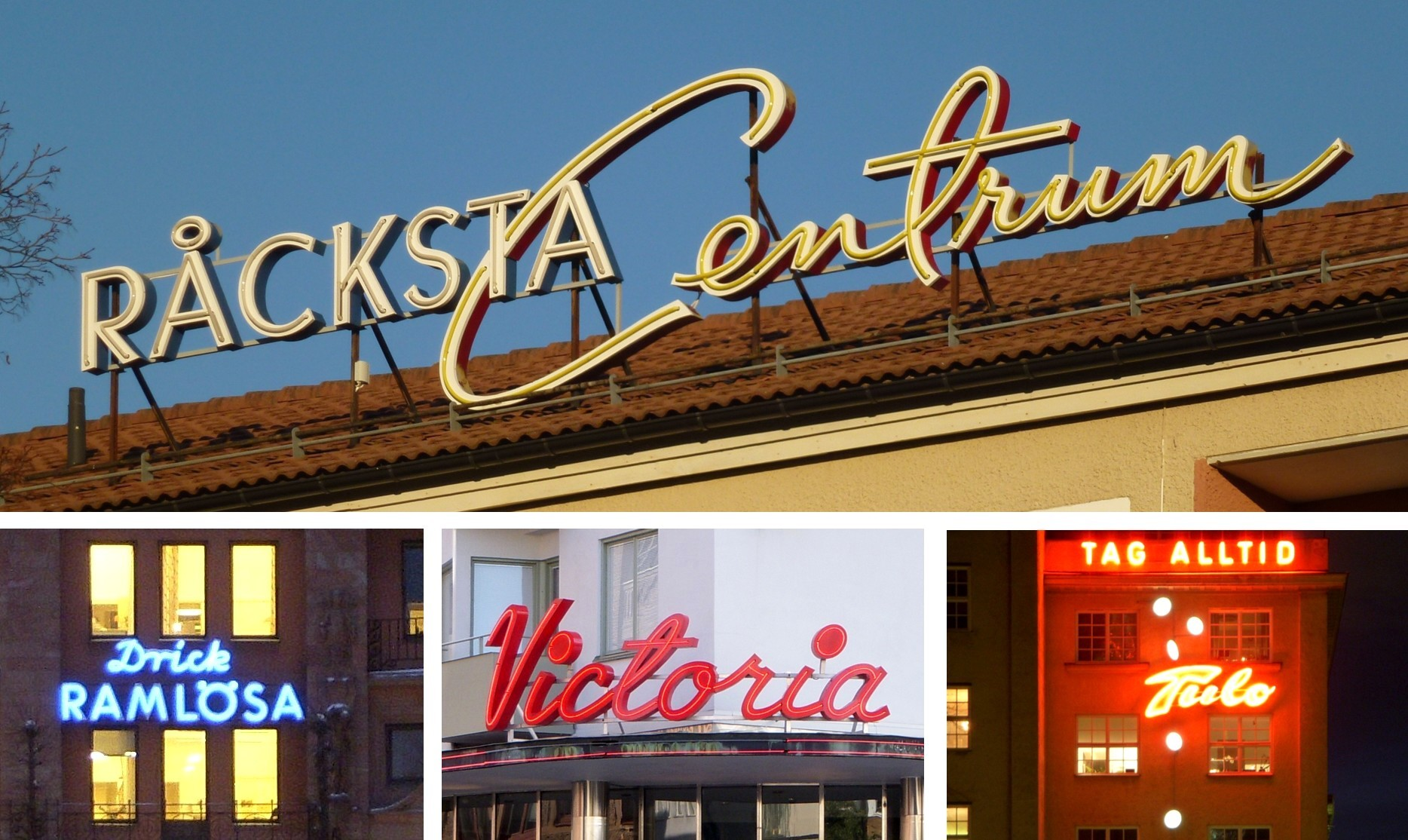 "Råcksta Centrum" skylt kollage med "Drick Ramlösa", "Victoria" och "Tulo"